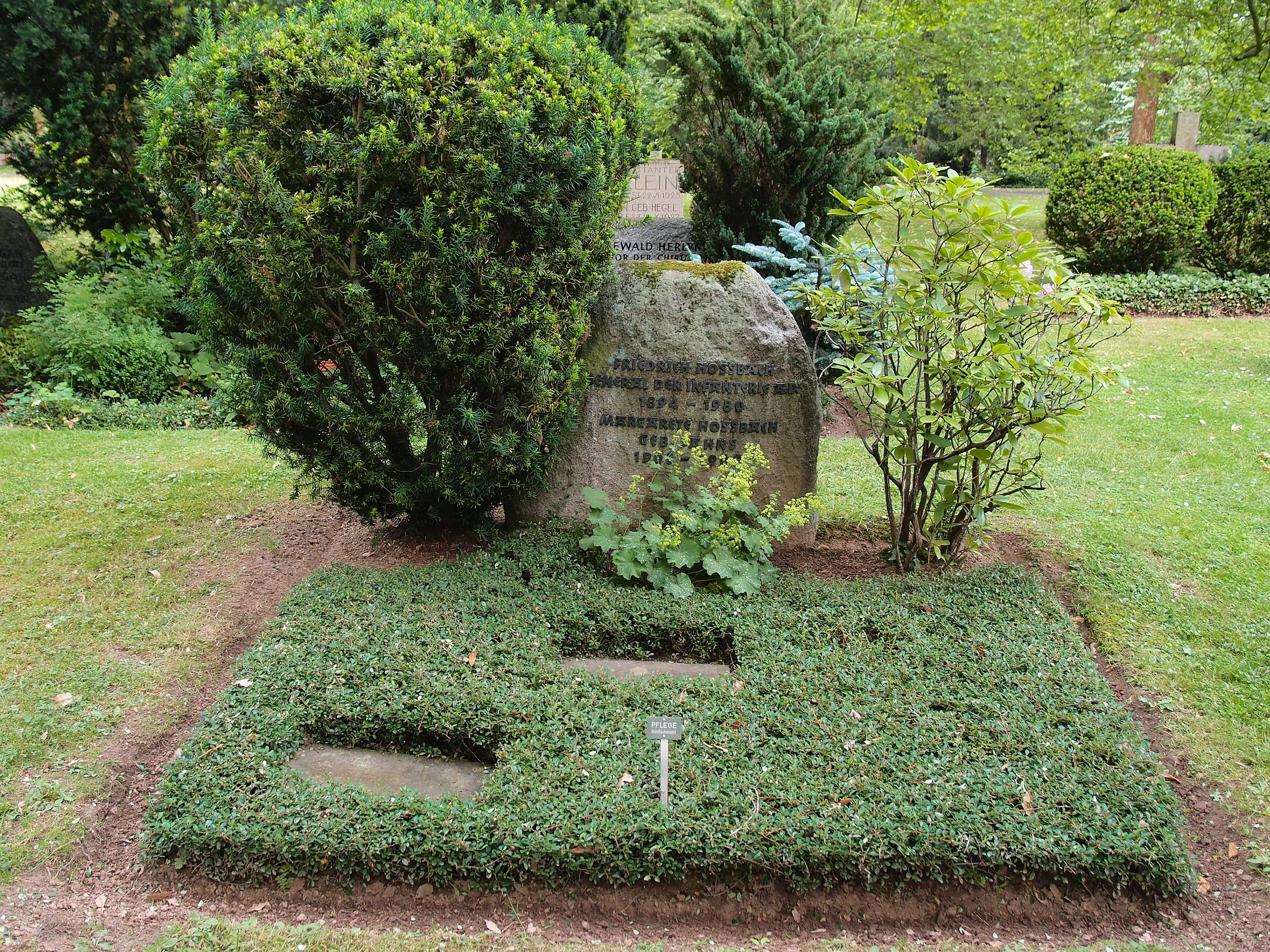 Grab von Friedrich Hoßbach auf dem städtischen Friedhof der Stadt Göttingen an der Groner Landstraße